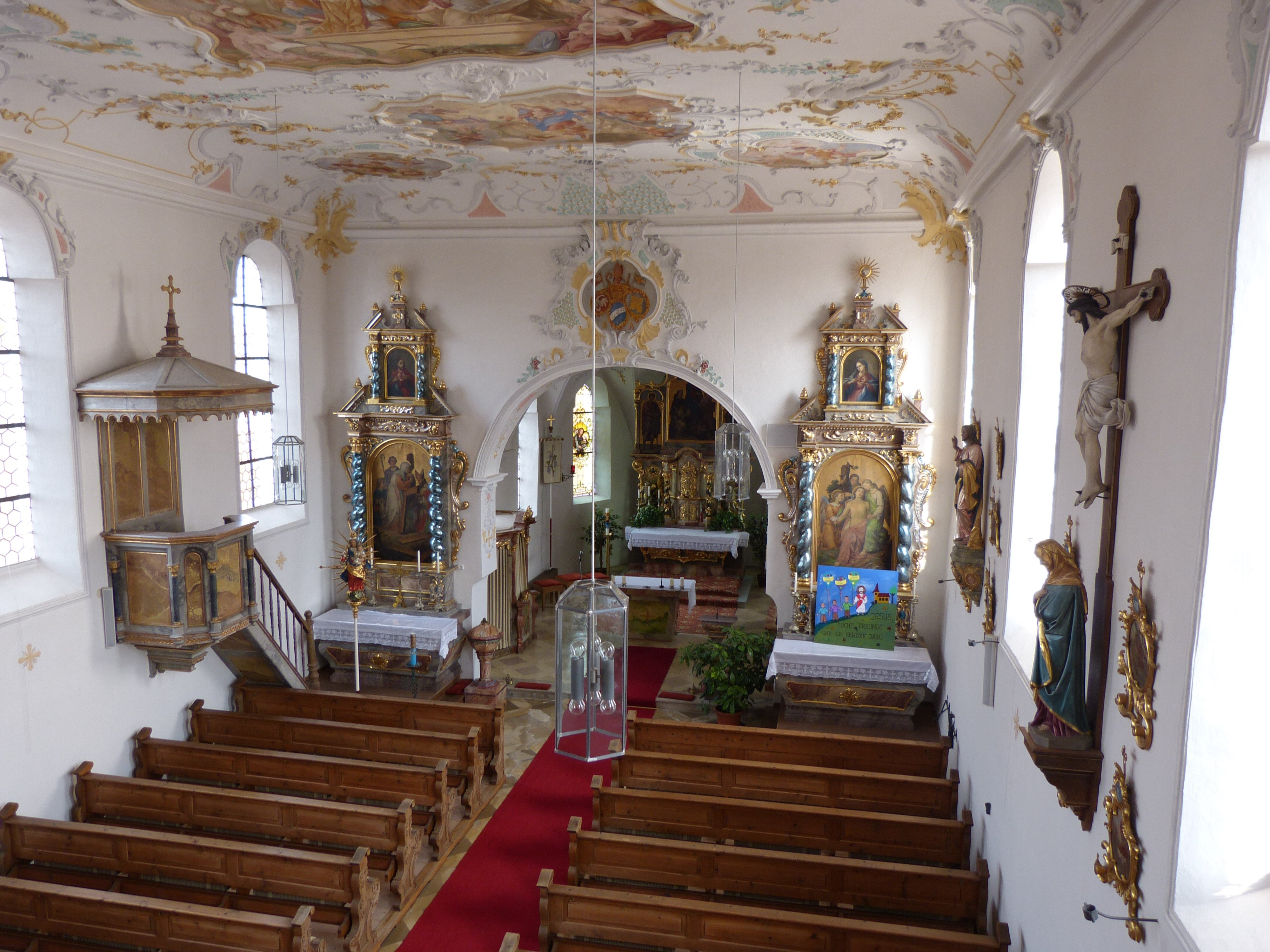 St. Gordian und Epimachus, Frechenrieden, Gemeinde Markt Rettenbach, Landkreis Unterallgäu, Bayern